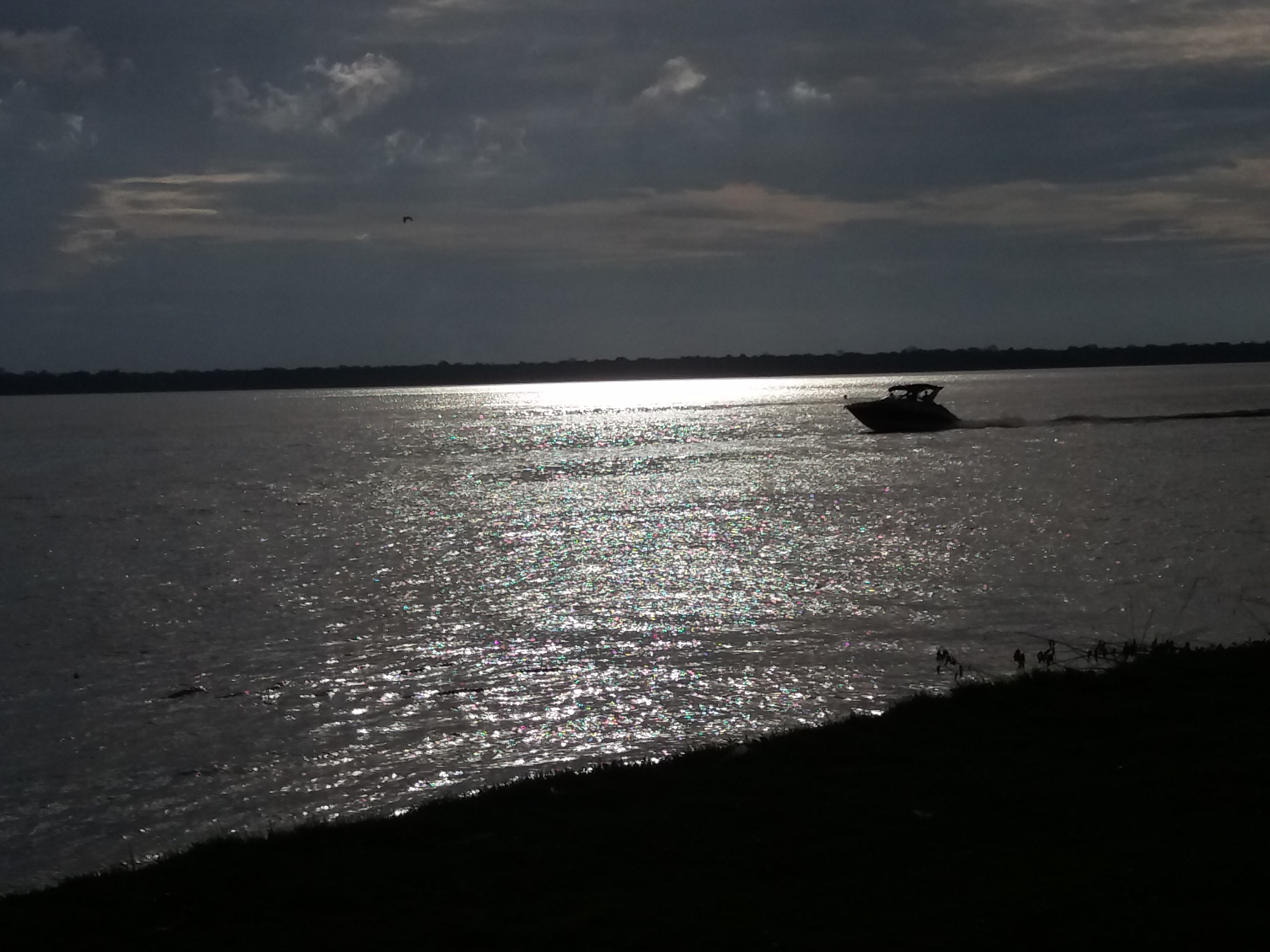 Vista do rio Guamá ao cair da tarde.